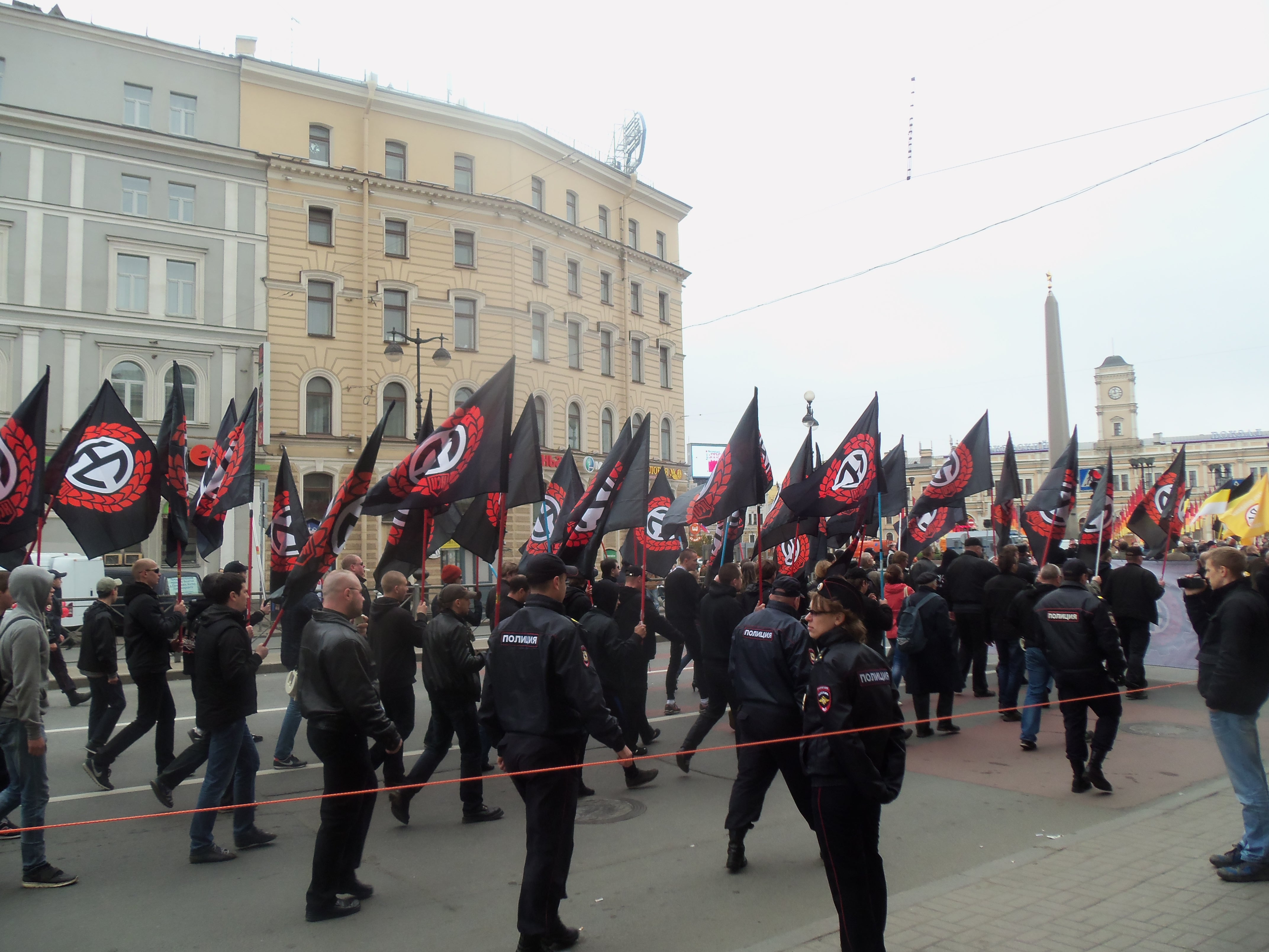 Колонна национал-социалистов идёт по Лиговскому пр. на первомайском шествии в Петербурге